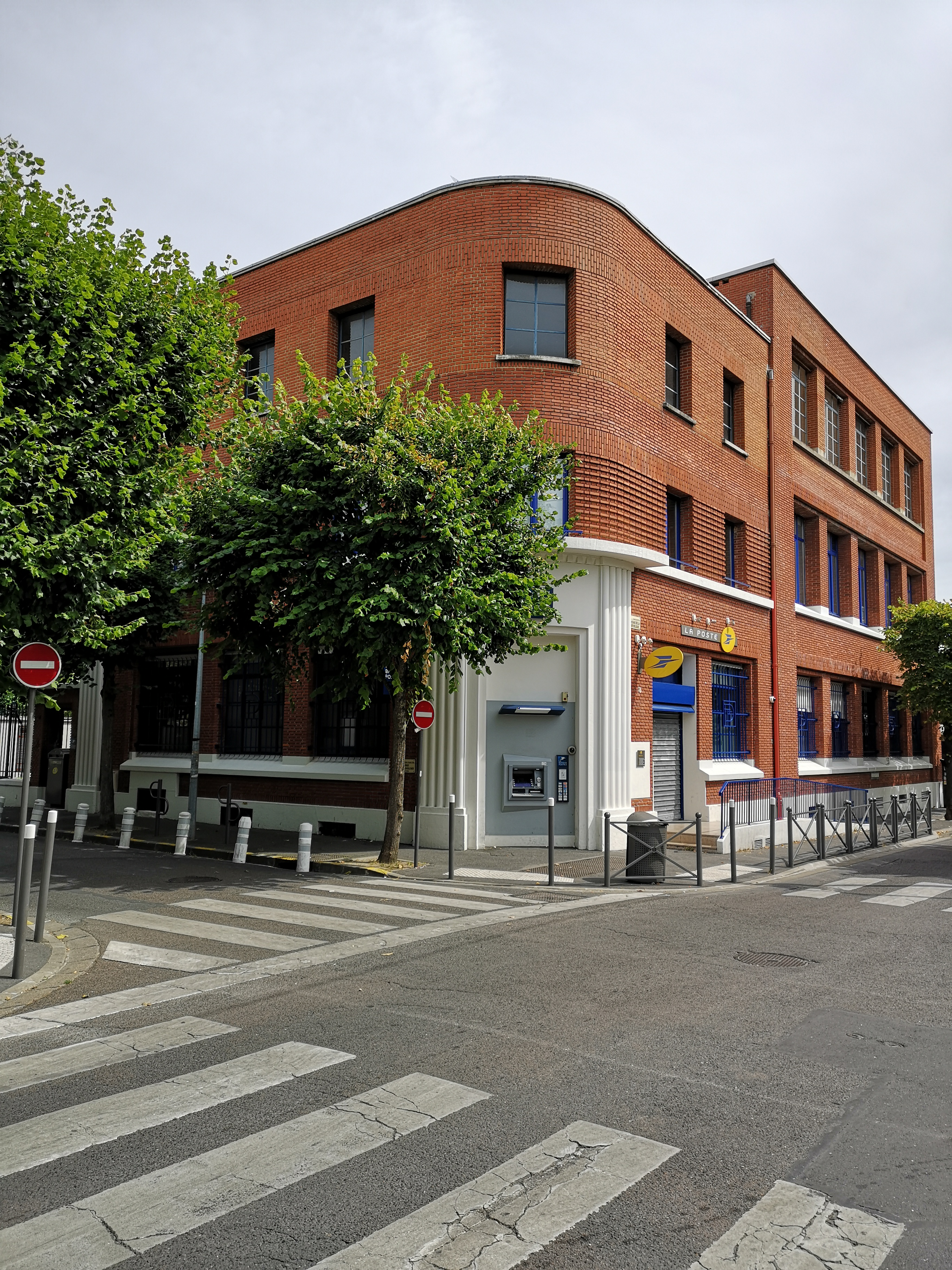 Inaugurée en 1938